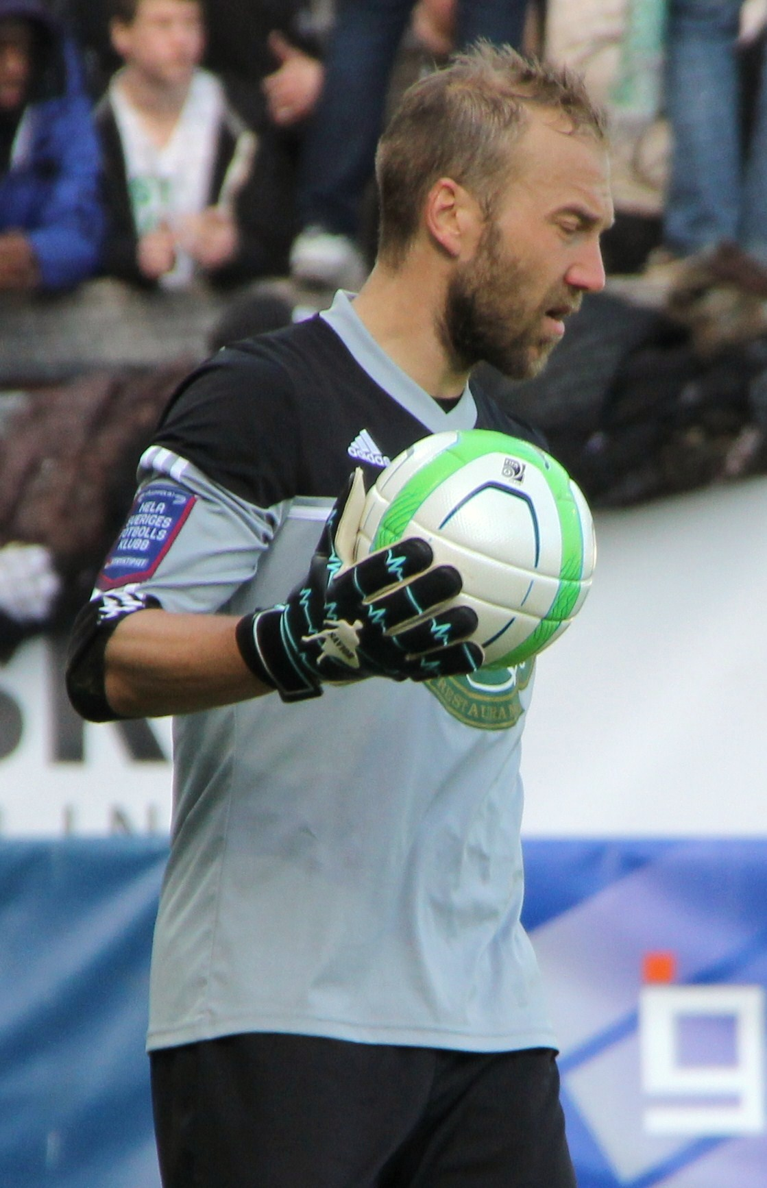 IFK Värnamos målvakt Björn Åkesson.